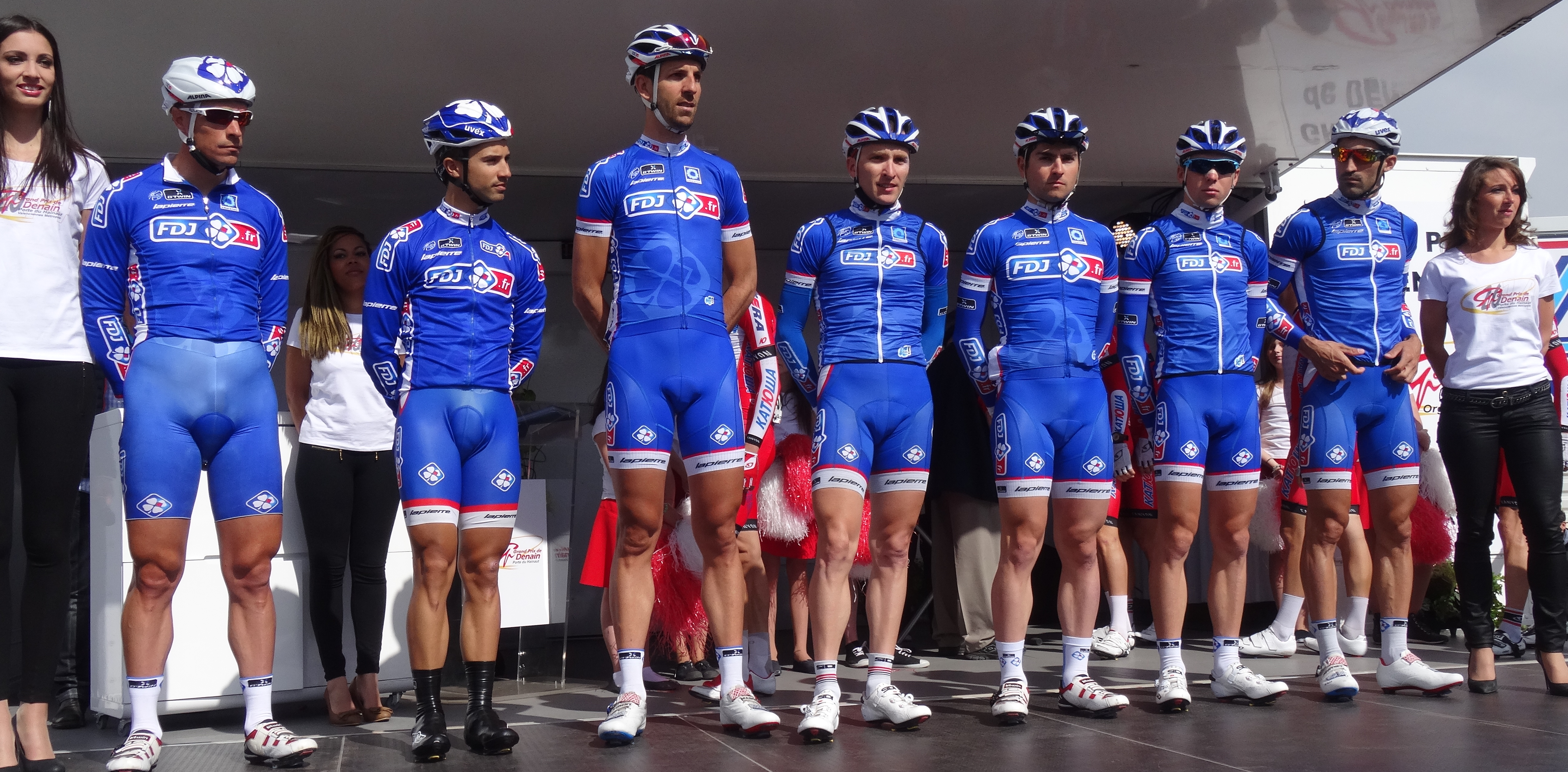 Reportage réalisé le jeudi 17 avril à l'occasion du départ et de l'arrivée du Grand Prix de Denain 2014 à Denain, Nord, Nord-Pas-de-Calais, France.